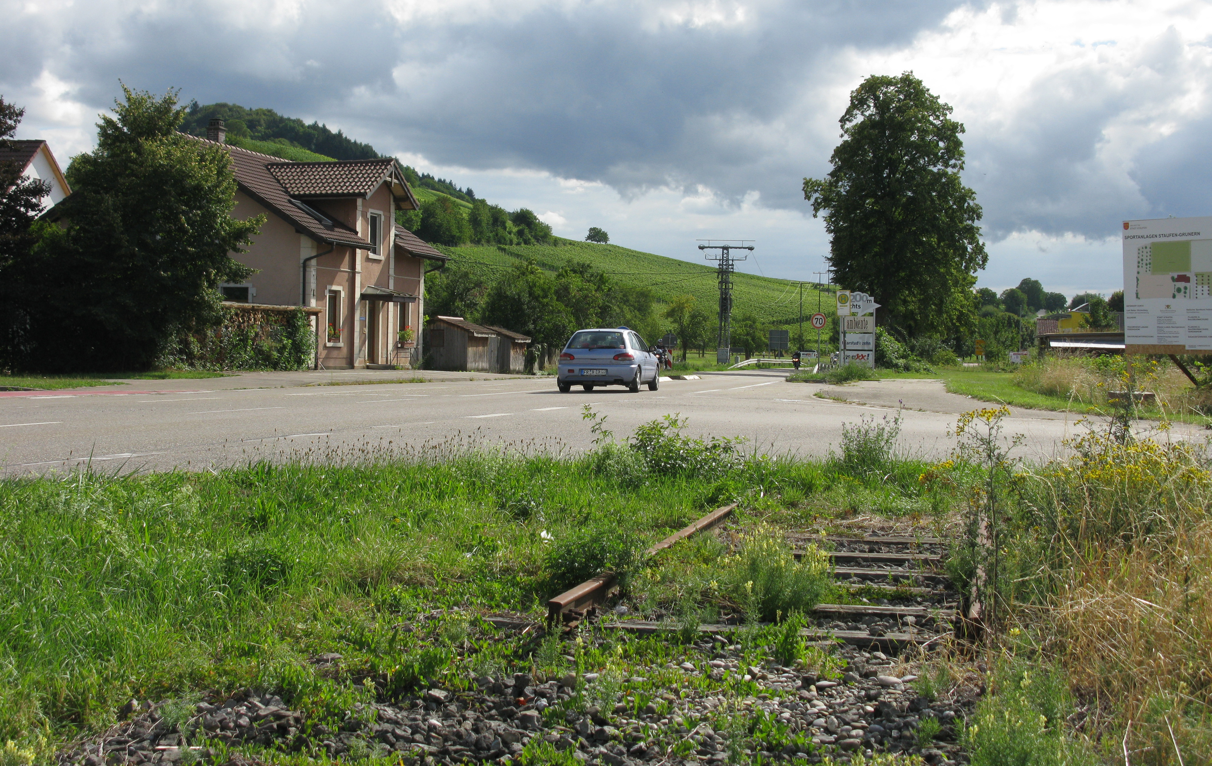 Gleise der ehemaligen Bahnstrecke Staufen-Sulzburg in Staufen-Grunern, links das ehemalige Bahnhofsrestaurant